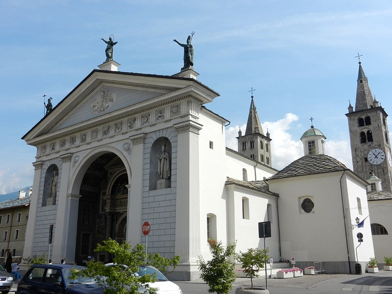 Aosta - Cattedrale